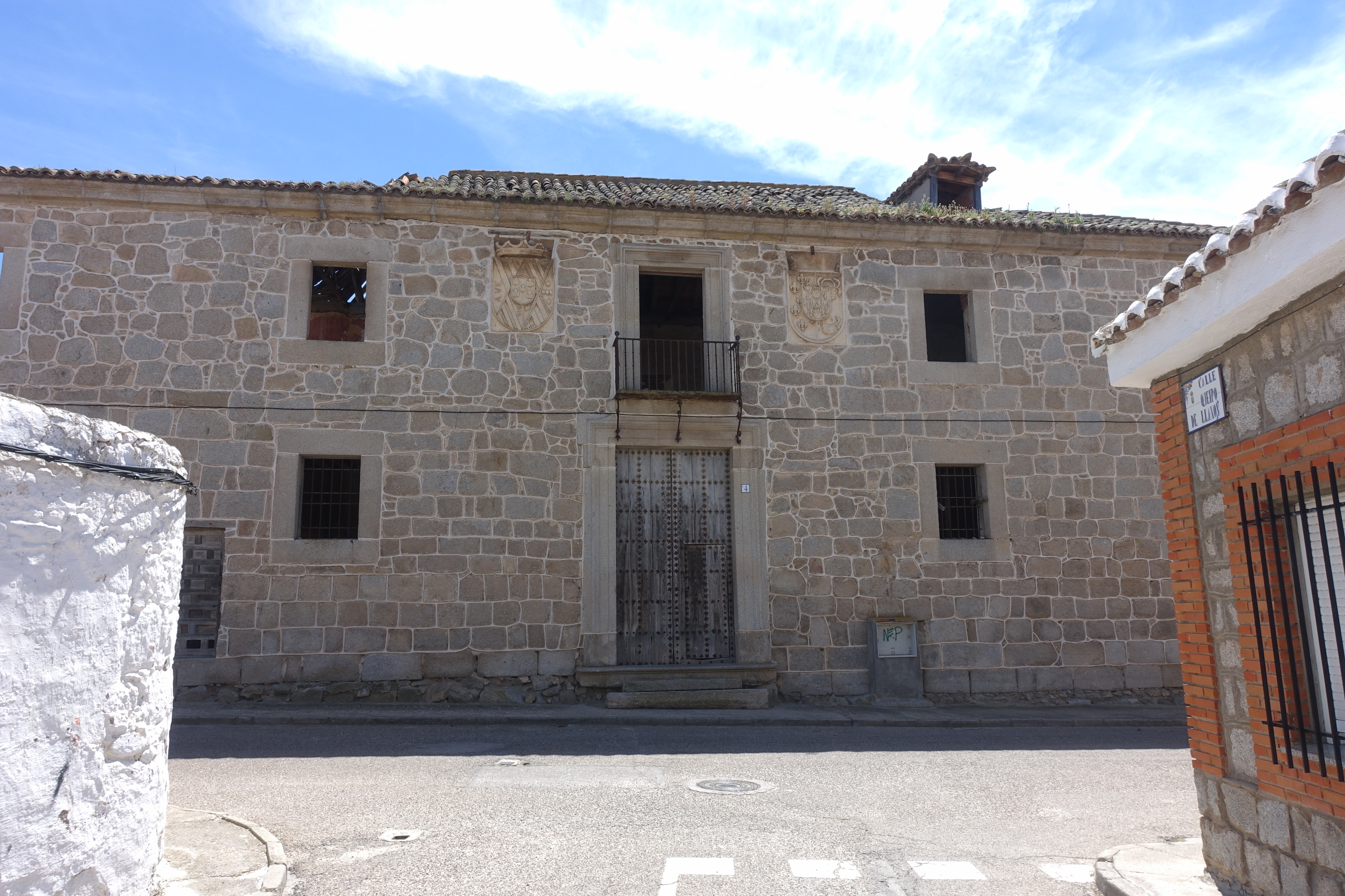 Antiguo Colegio de Gramáticos en Cuerva (Toledo, España).